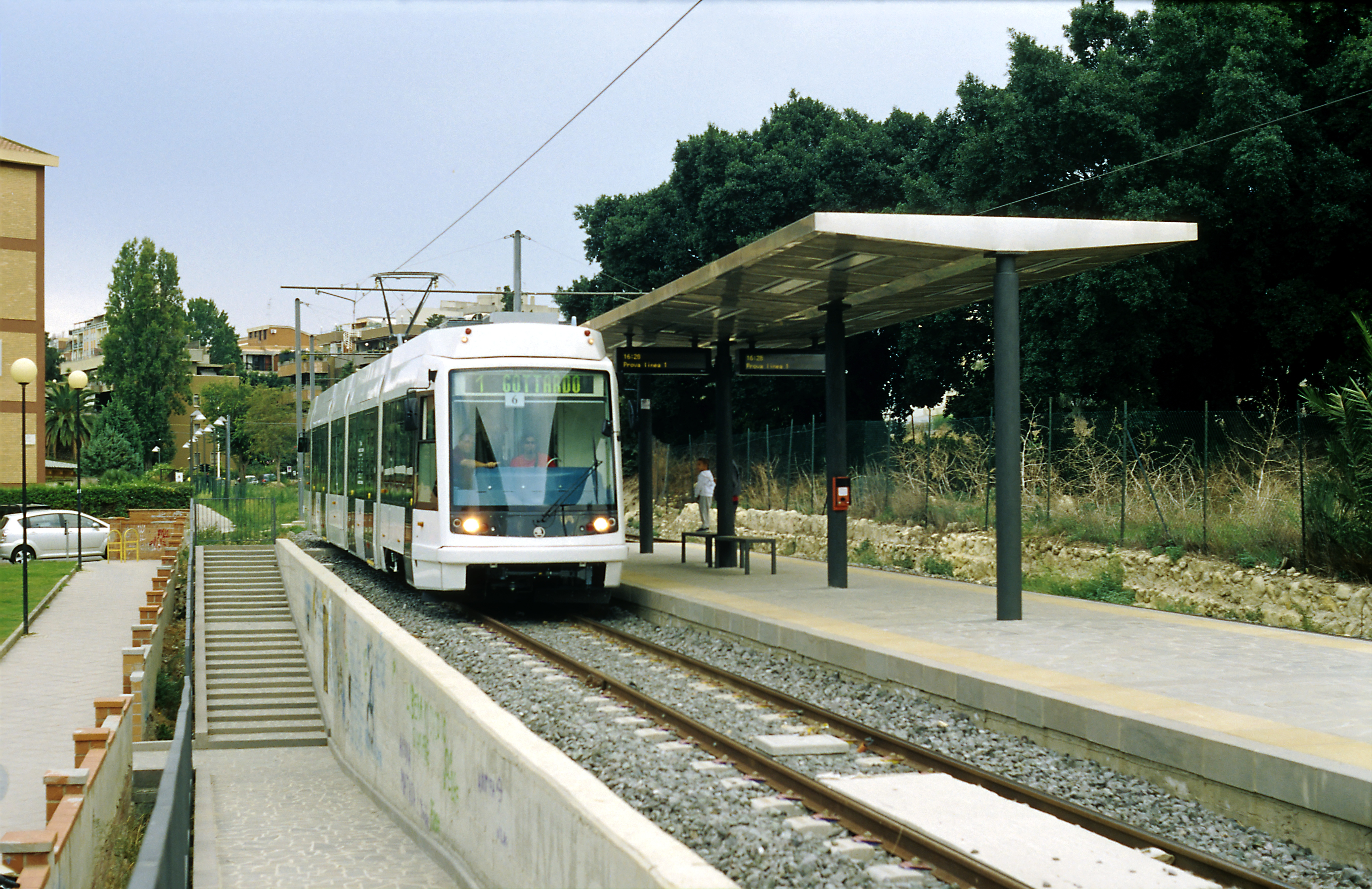 Probefahrten vor der Inbetriebnahme der Stadtbahn, Richtung Gottardo